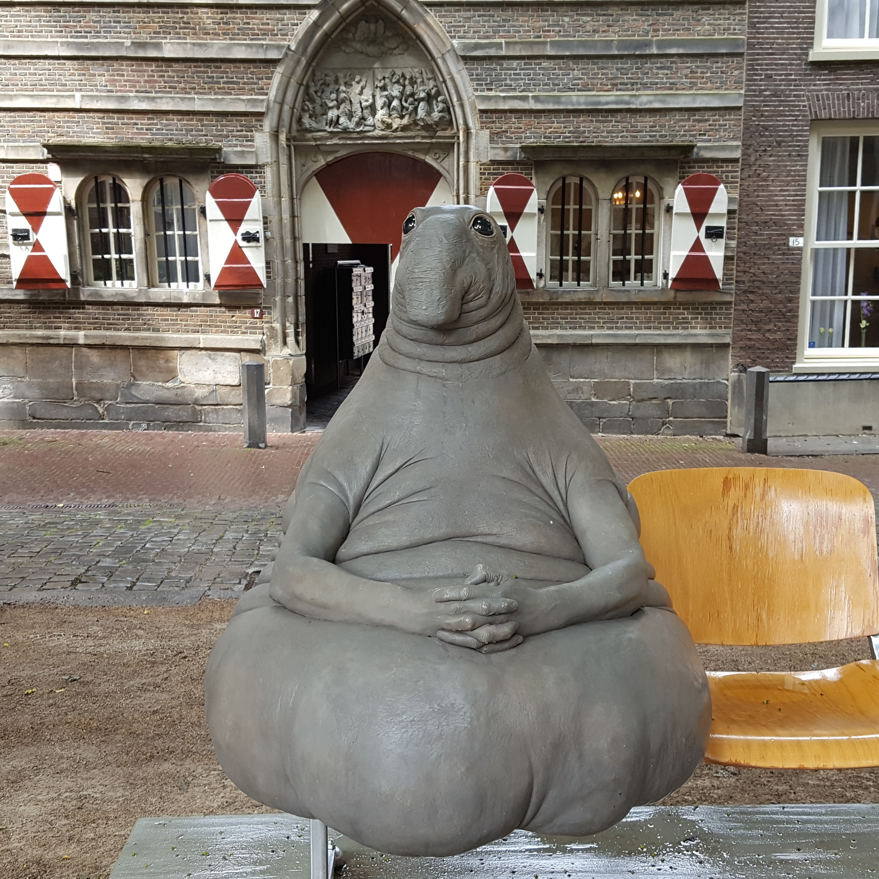 Ждун.